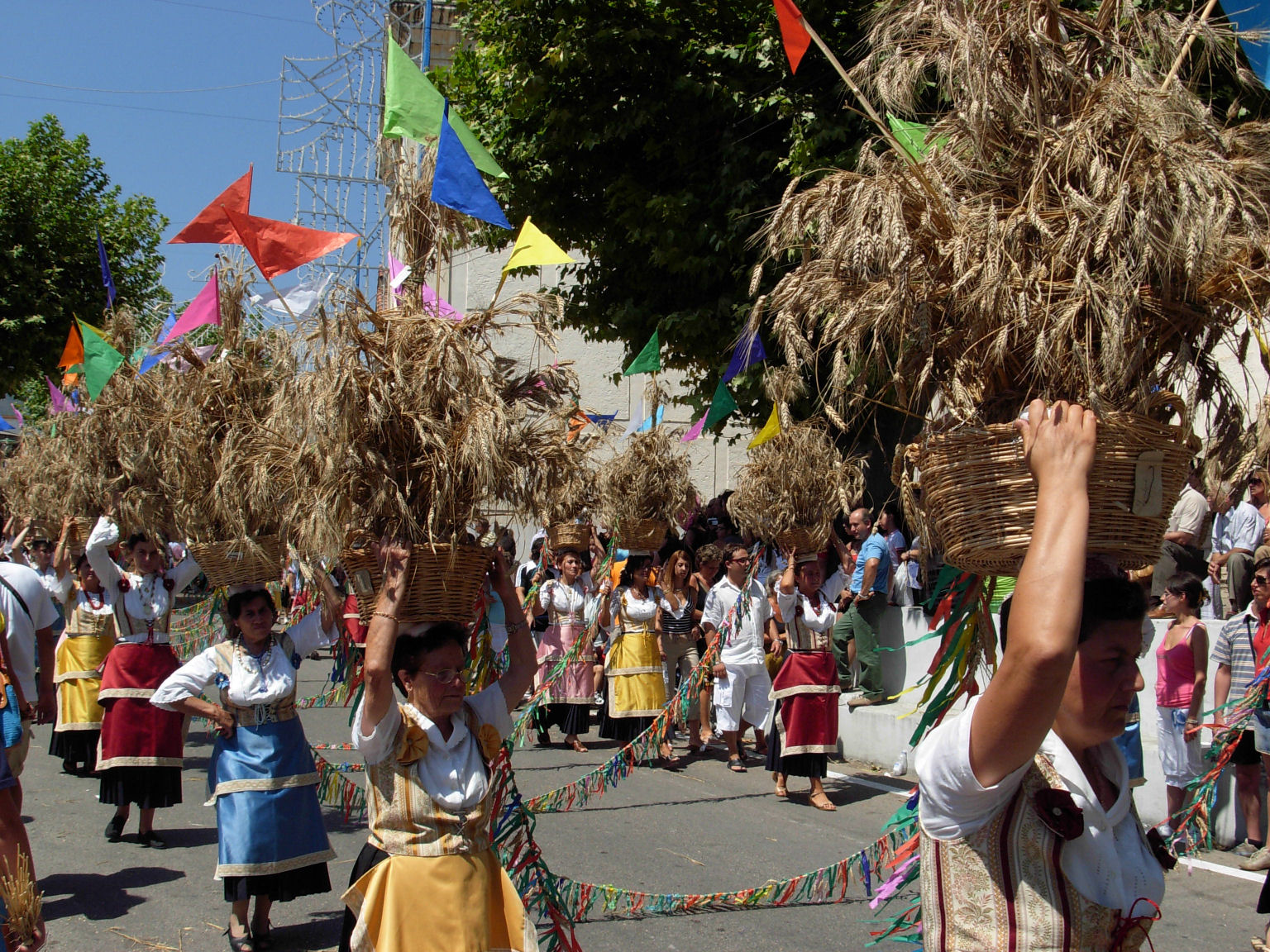 Festa del Grano di Foglianise (BN), Italia: la processione delle donne con le ceste di grano